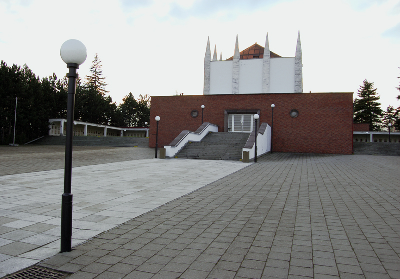 Krematorium na brněnském Ústředním hřbitově